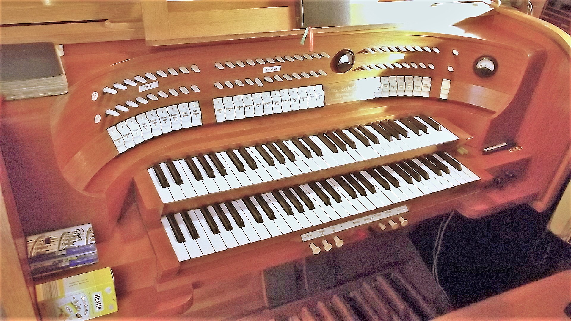 Spieltisch der Seifert-Orgel in Düppenweiler